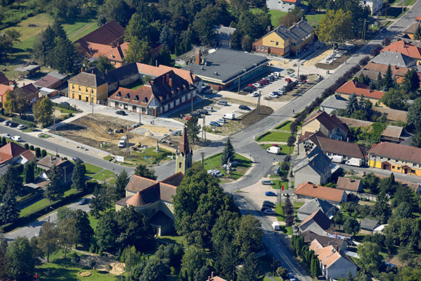 Vép, légi fotó